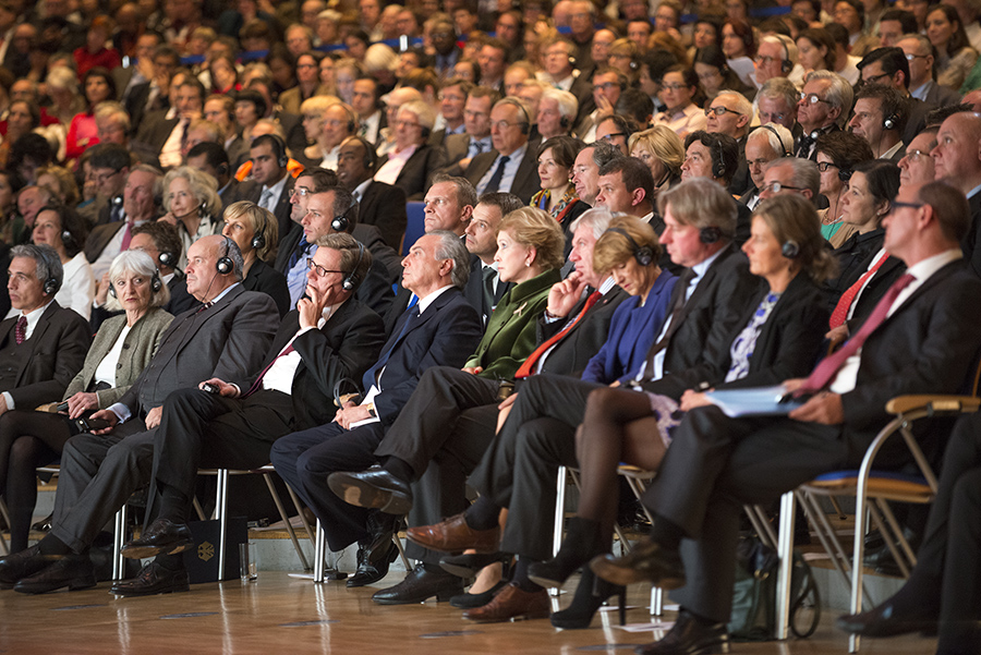 Alemanha | A participação brasileira na cerimônia de abertura da Feira do Livro de Frankfurt, na noite desta terça-feira (8), foi marcada pelo discurso do vice-presidente do Brasil, Michel Temer, dos escritores Ana Maria Machado e Luiz Ruffato, e pela inauguração do Pavilhão Brasileiro, feita pela ministra da Cultura, Marta Suplicy. bit.ly/1apI7xP 08.10.2013 Foto: Johan Viseek